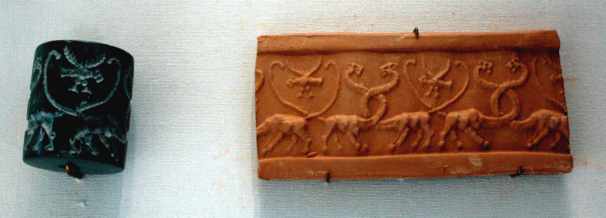 fotokwaliteit Cylinder seal lions Louvre MNB1167b.jpg